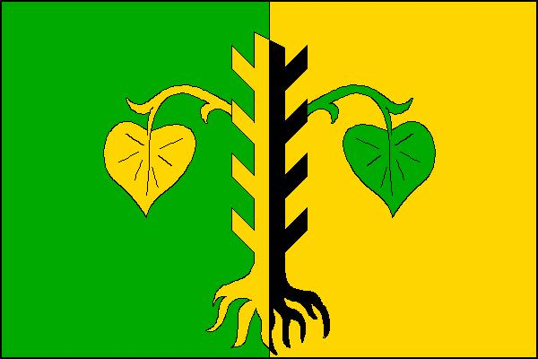 Vlajka obce Mladoňovice (okres Chrudim)